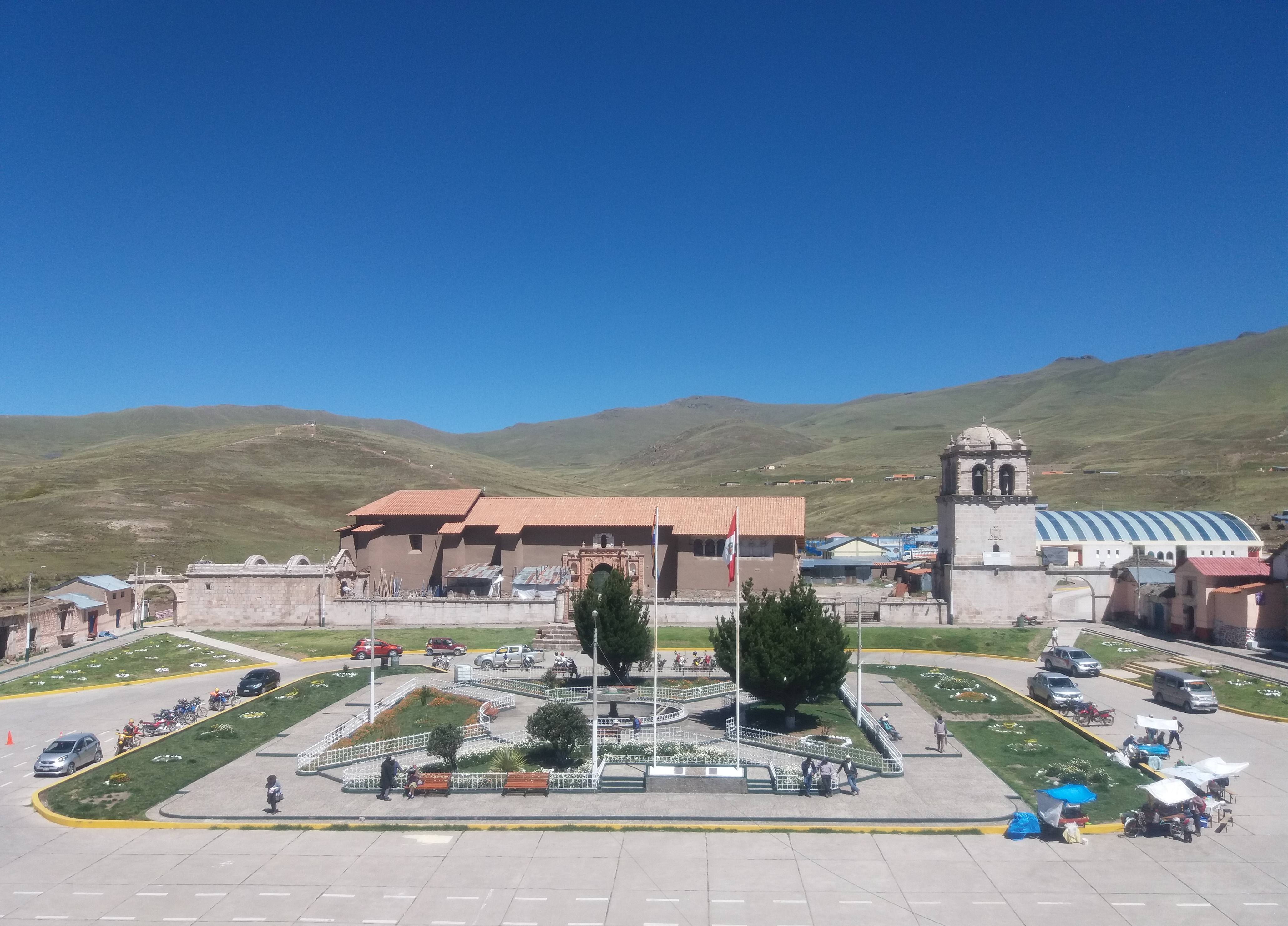 Plaza de Armas del Distrito de Coporaque - Espinar - Cusco - 2016